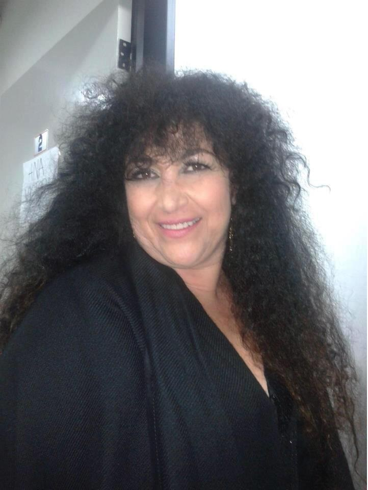 Una Diva de la música en Español